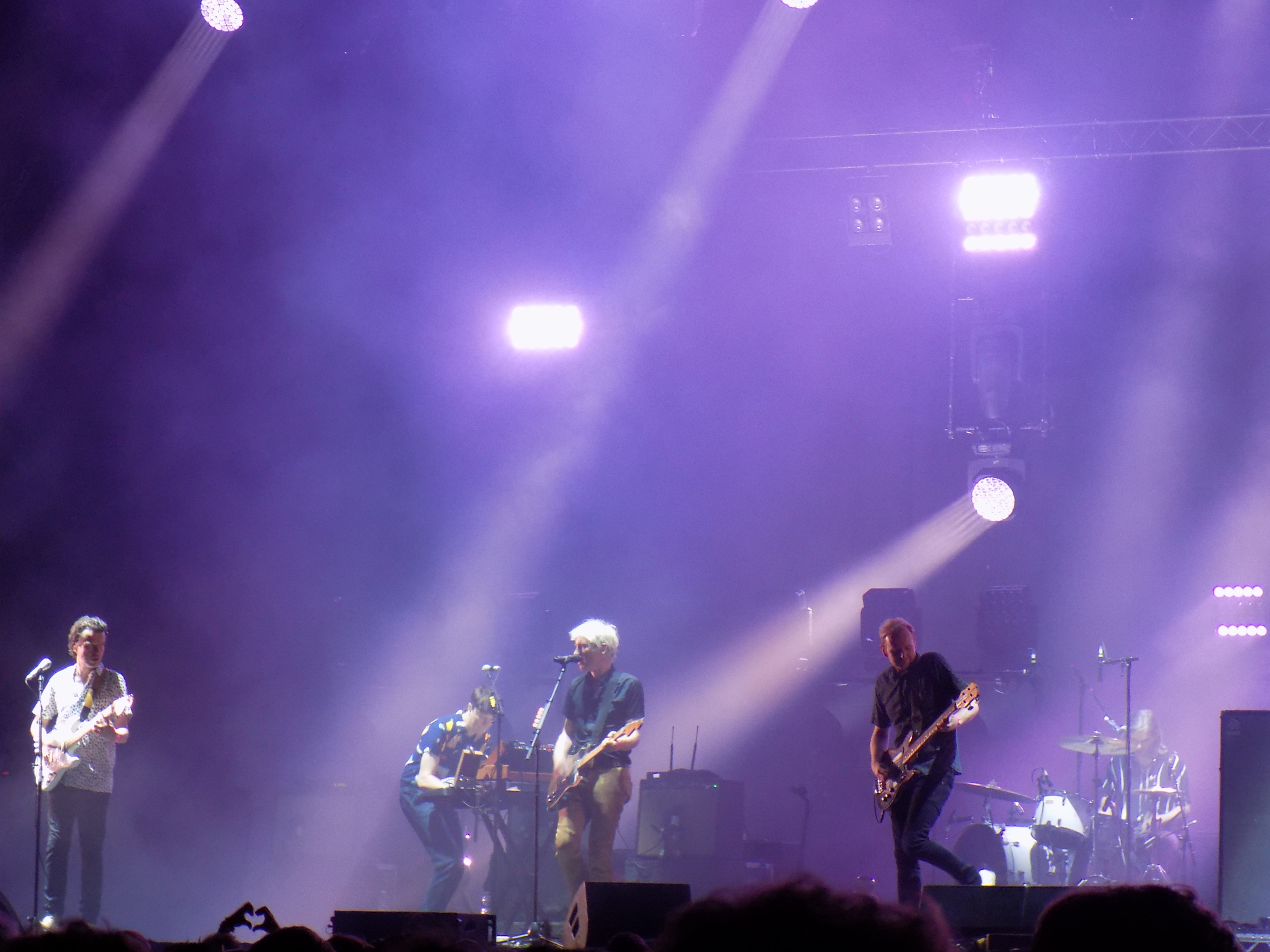 Franz Ferdinand à l'édition 2017 du Cabaret Vert à Charleville-Mézières le 26 août 2017.